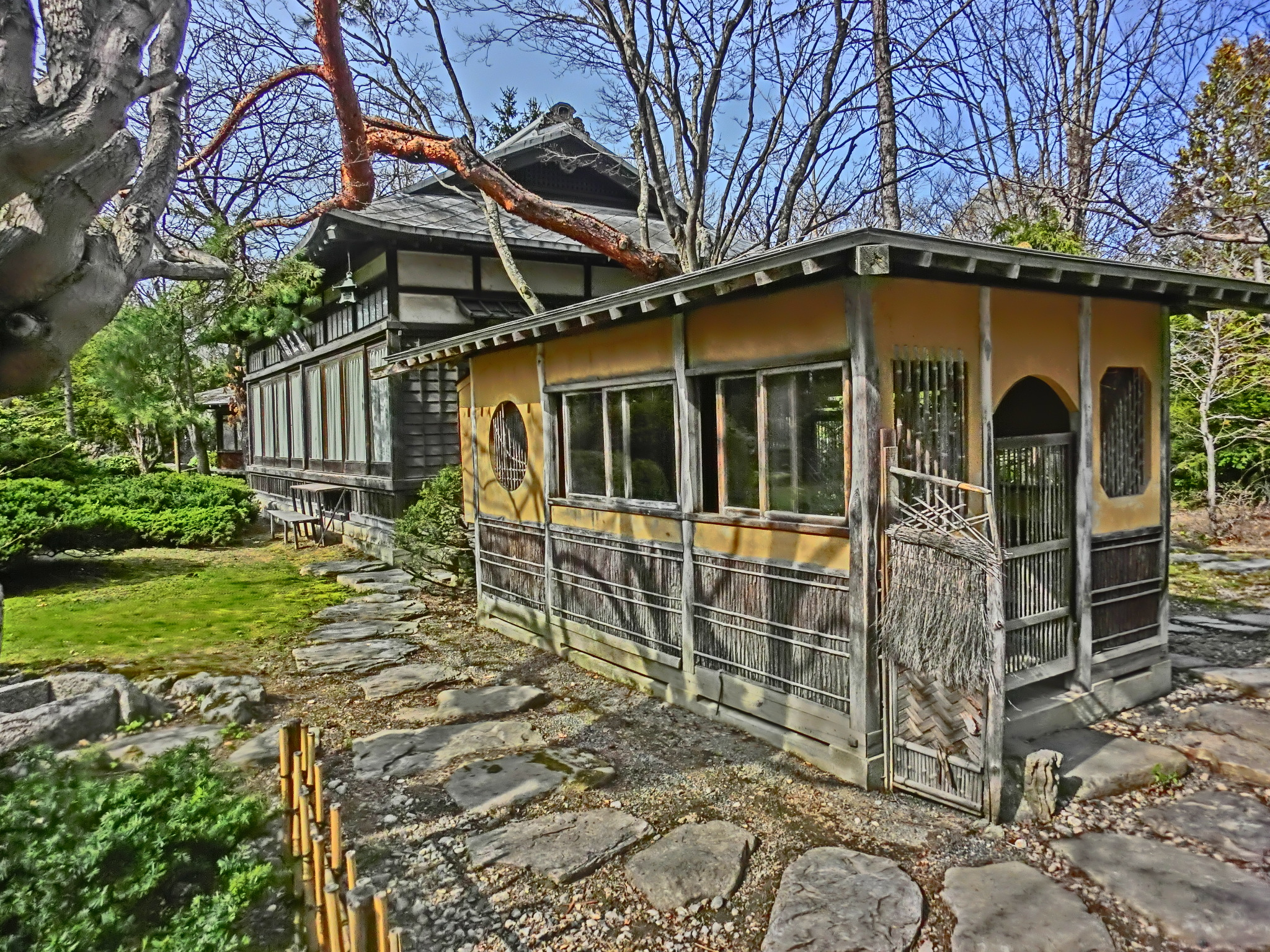 帯広市 真鍋農園 真正閣